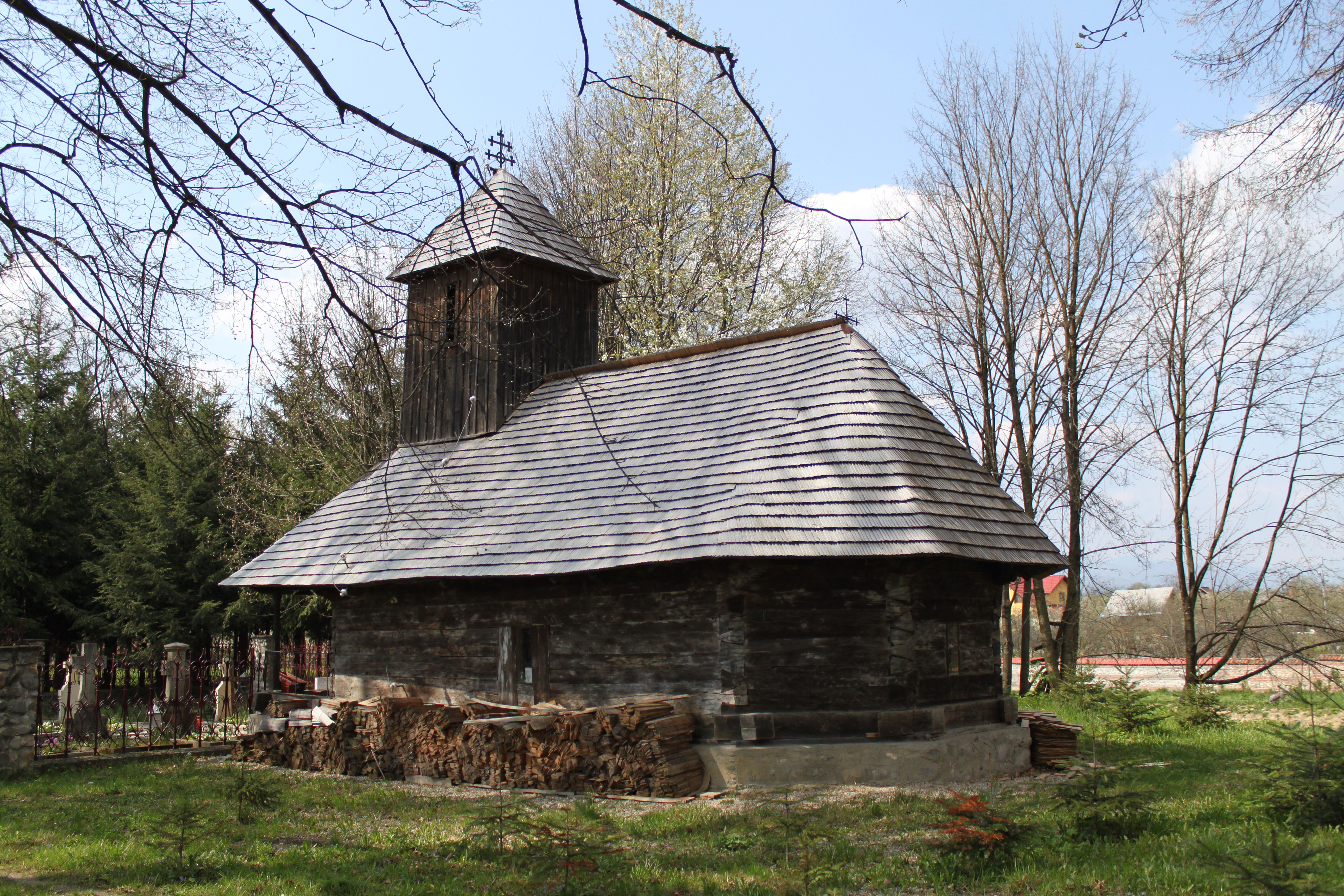 Biserica de lemn din Podu Broşteni, judeţul Argeş.